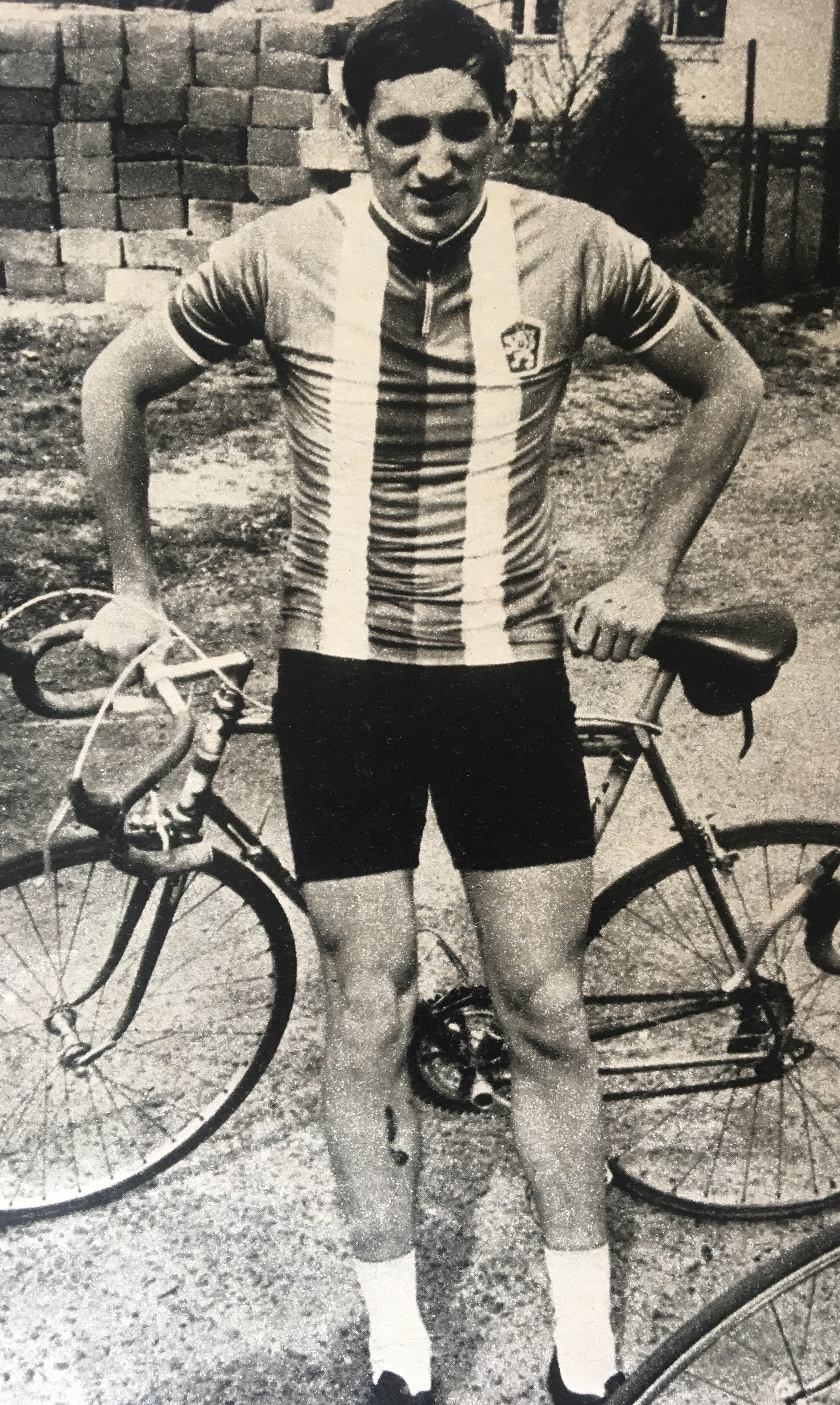 Petr Hladík v reprezentačním dresu